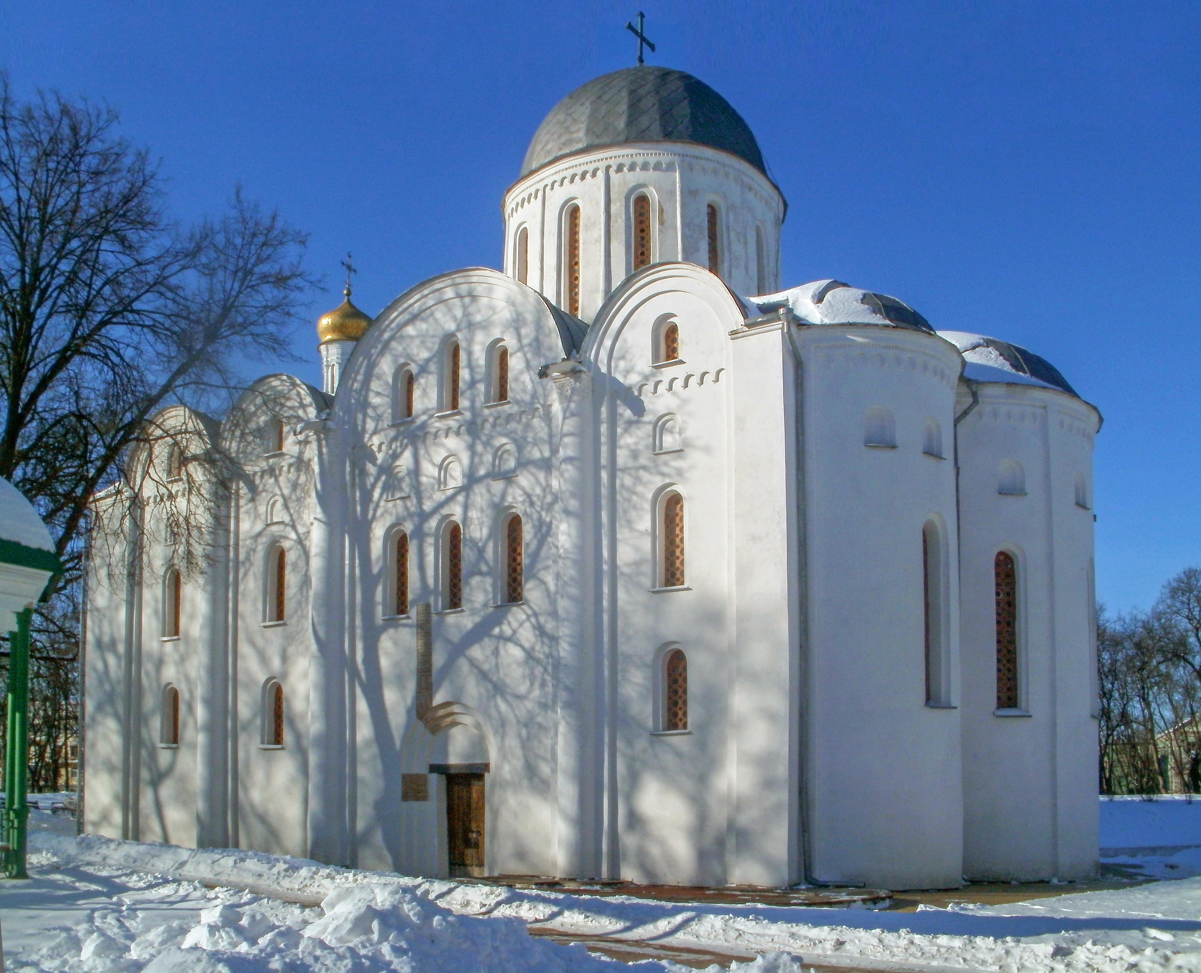 Борисоглібський собор (мур.), Чернігів, Вал